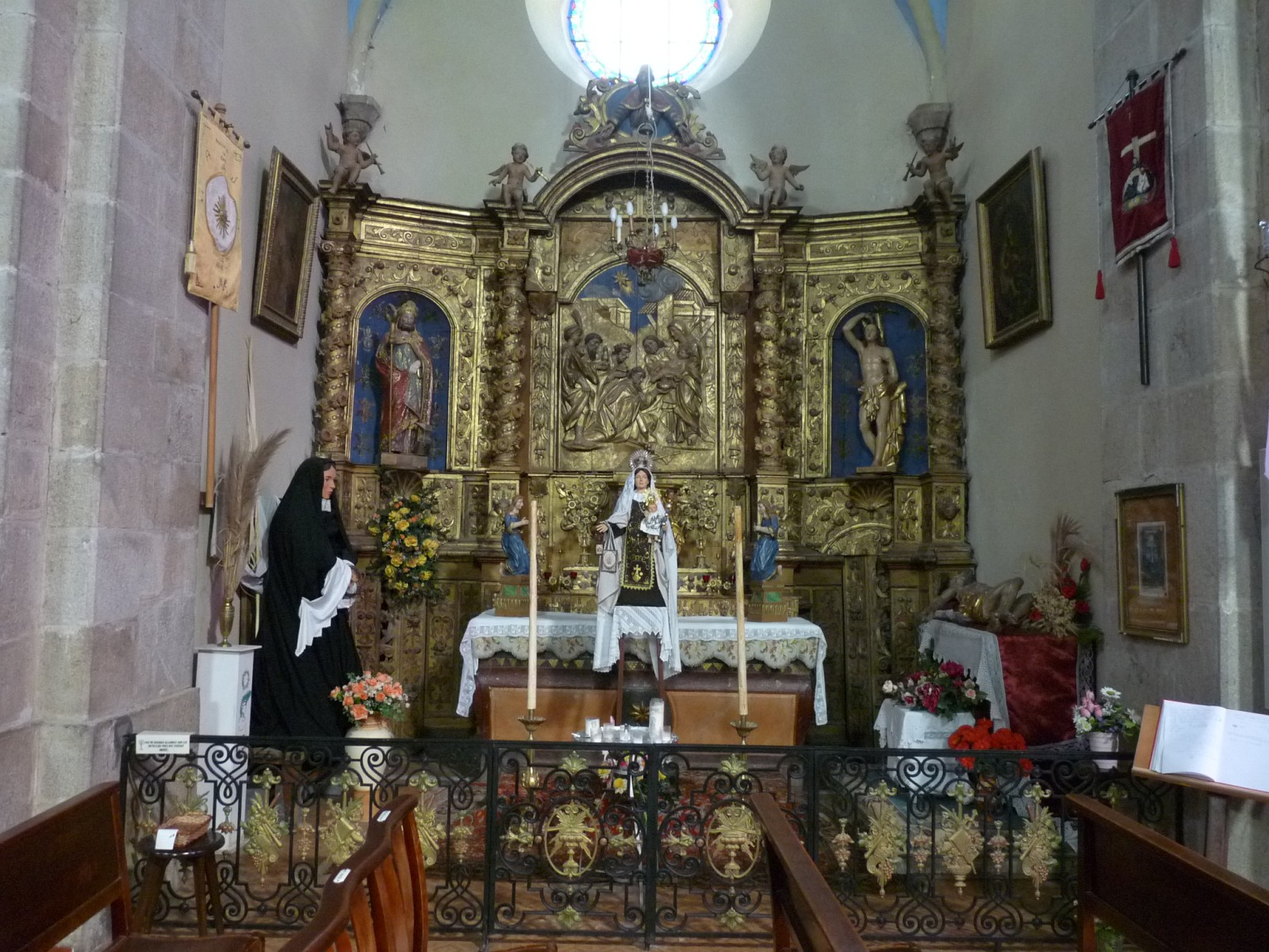 Autel latéral, église des Angles, Pyrénées-Orientales, France. Retable avec Adoration des rois mages, 18è siècle.